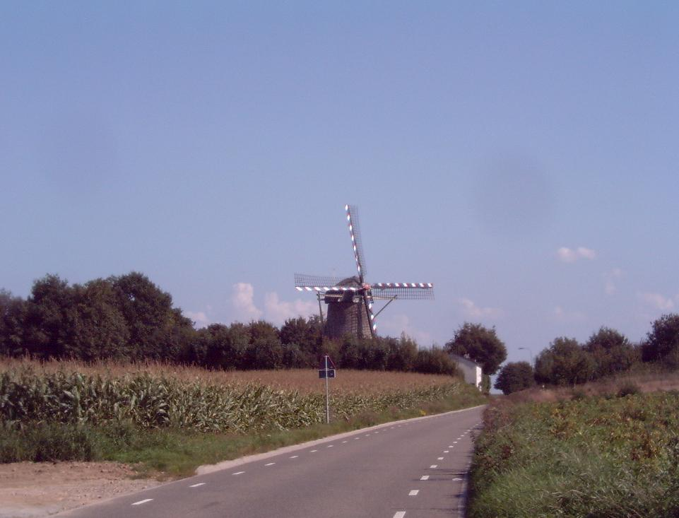 Limburgs: Windmeule op 't Wolfses